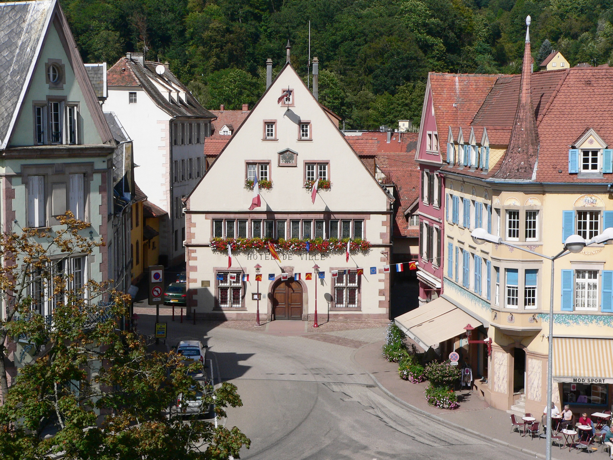 La Mairie de Munster et son environnement